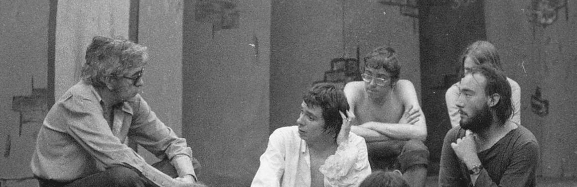 Eduardo Manet et la troupe du Bilboquet lors d'une répétition